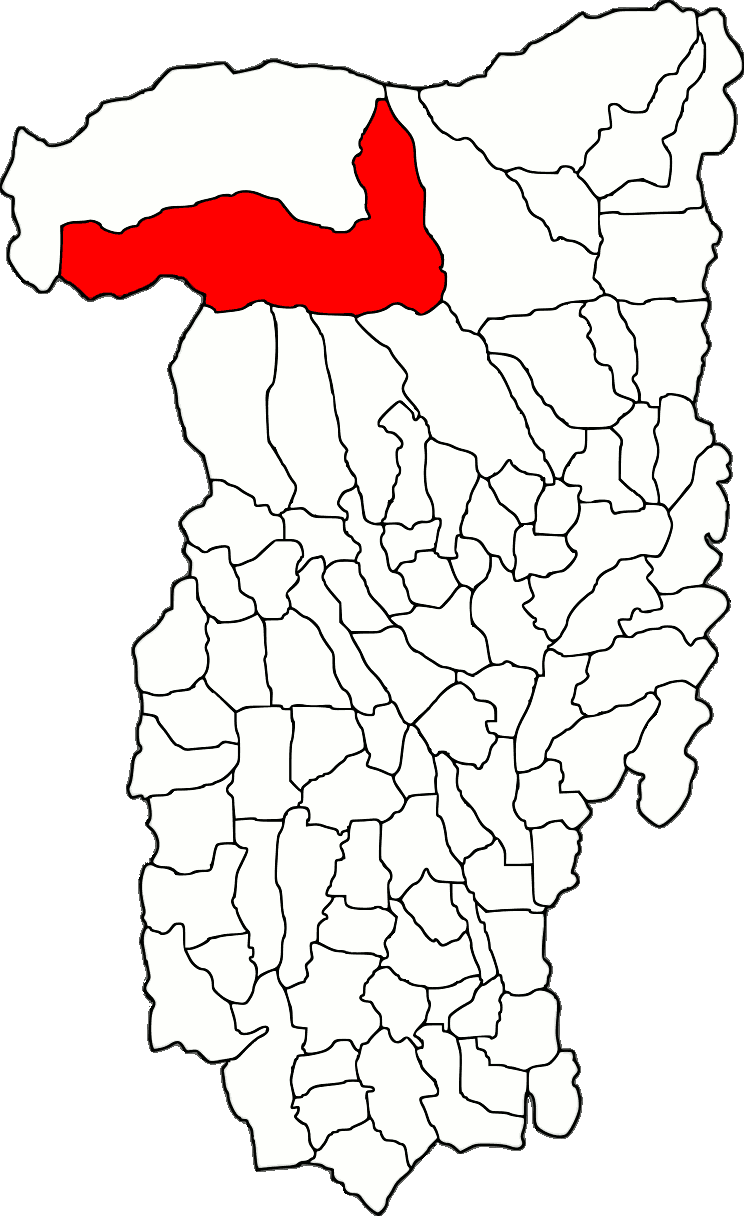 Lage der Gemeinde Malaia im Kreis Vâlcea (RO).